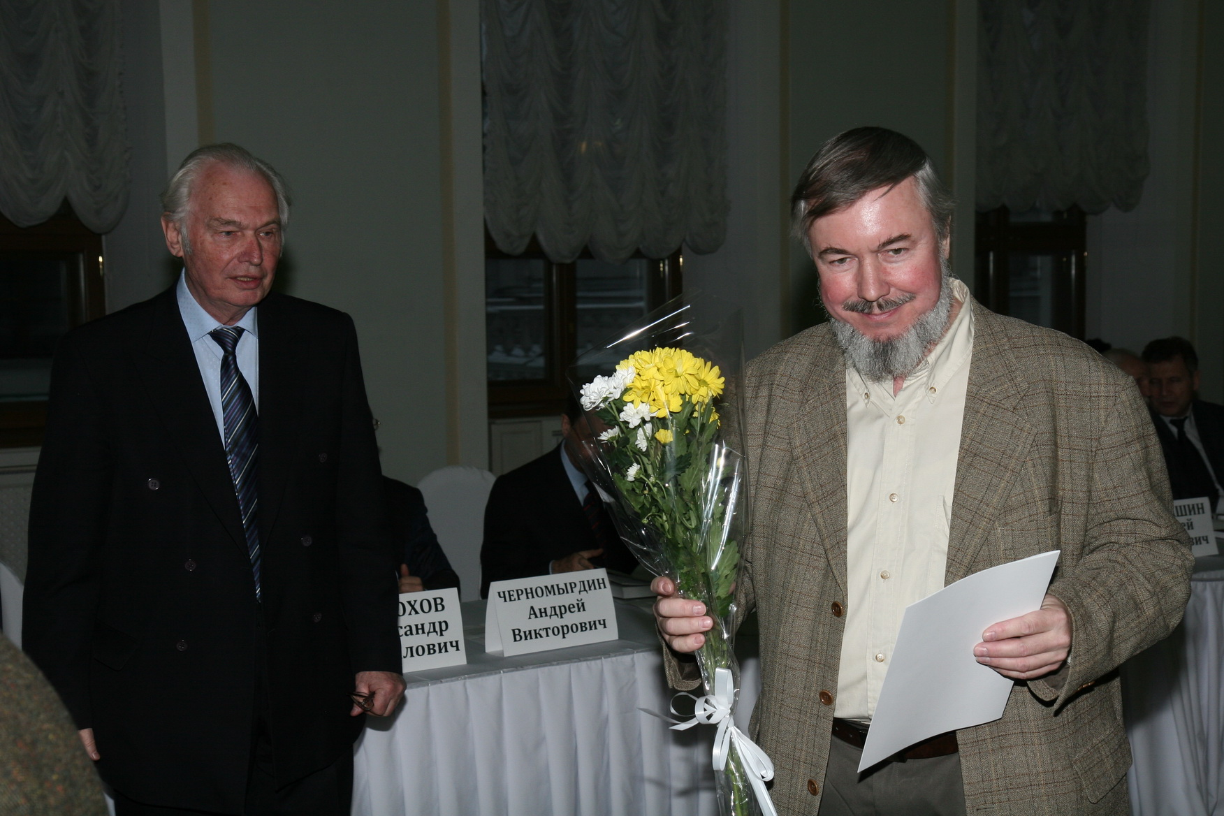 1-го декабря 2011 года в Российской Государственной библиотеке («Дом Пашкова») состоялась торжественная церемония вручения Большой литературной премии России за 2011 год